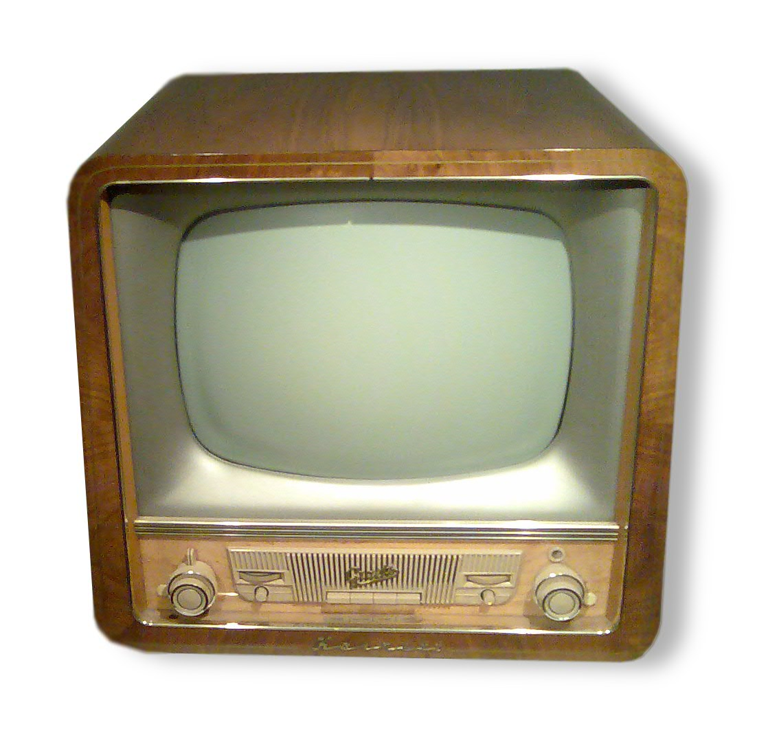 Fernseher Graetz Kornett, 1956